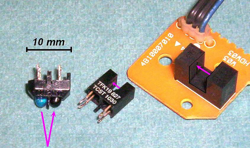 Gabelkoppler und Reflexkoppler, IR-Strahlwege magenta, links aus einem Videorecorder, rechter Gabelkoppler aus einem Drucker